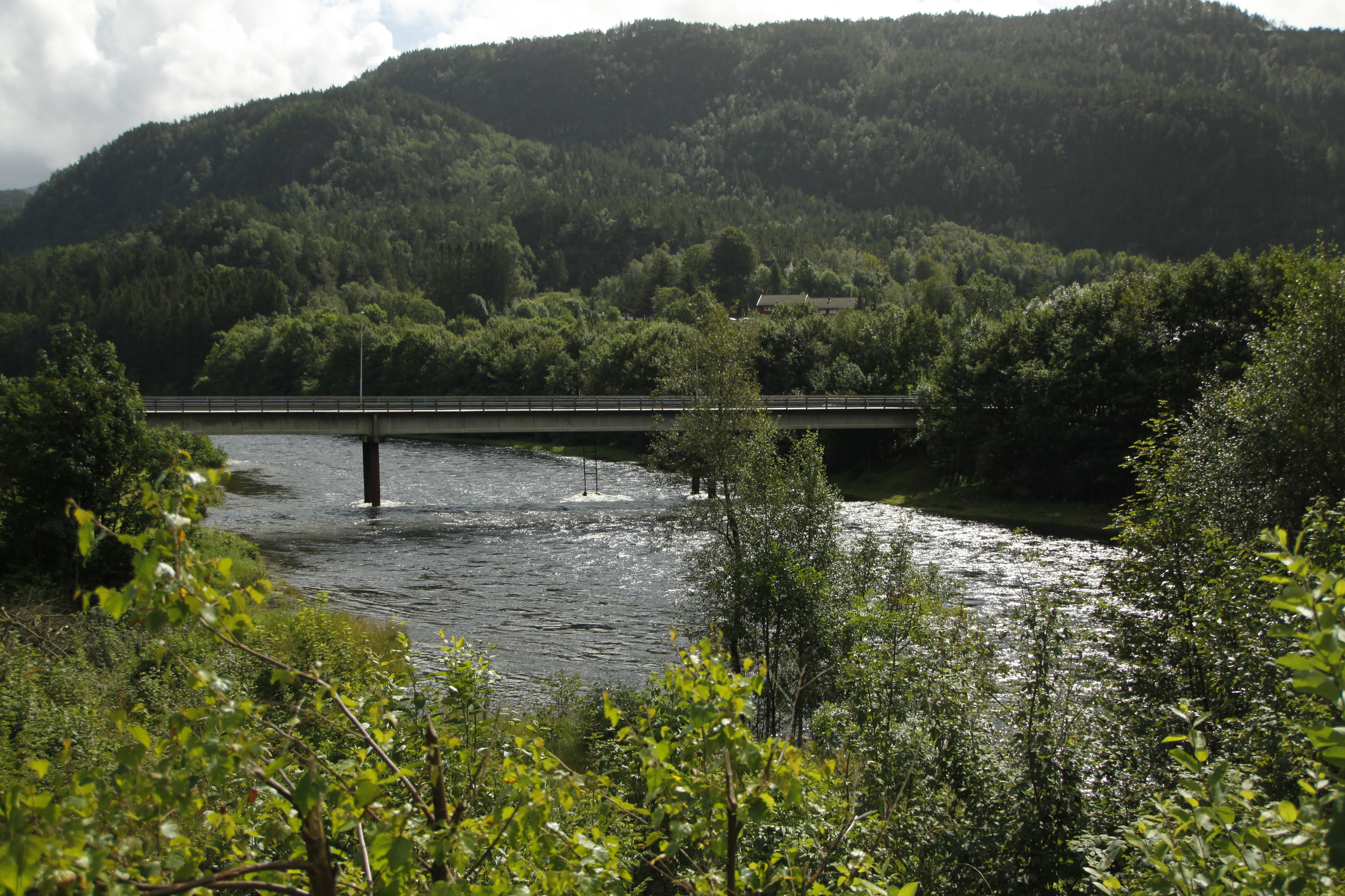 Litlehaga II, Suldal, Norway